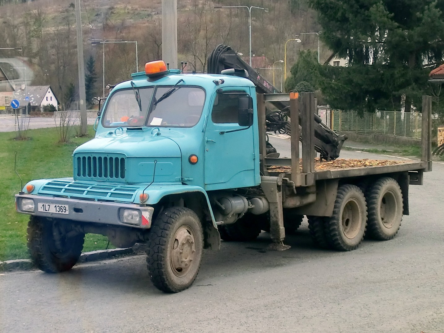 Modernizovaná Praga V3S (asi výroba BAZ Bratislava) na křižovatce v Hrabačově.